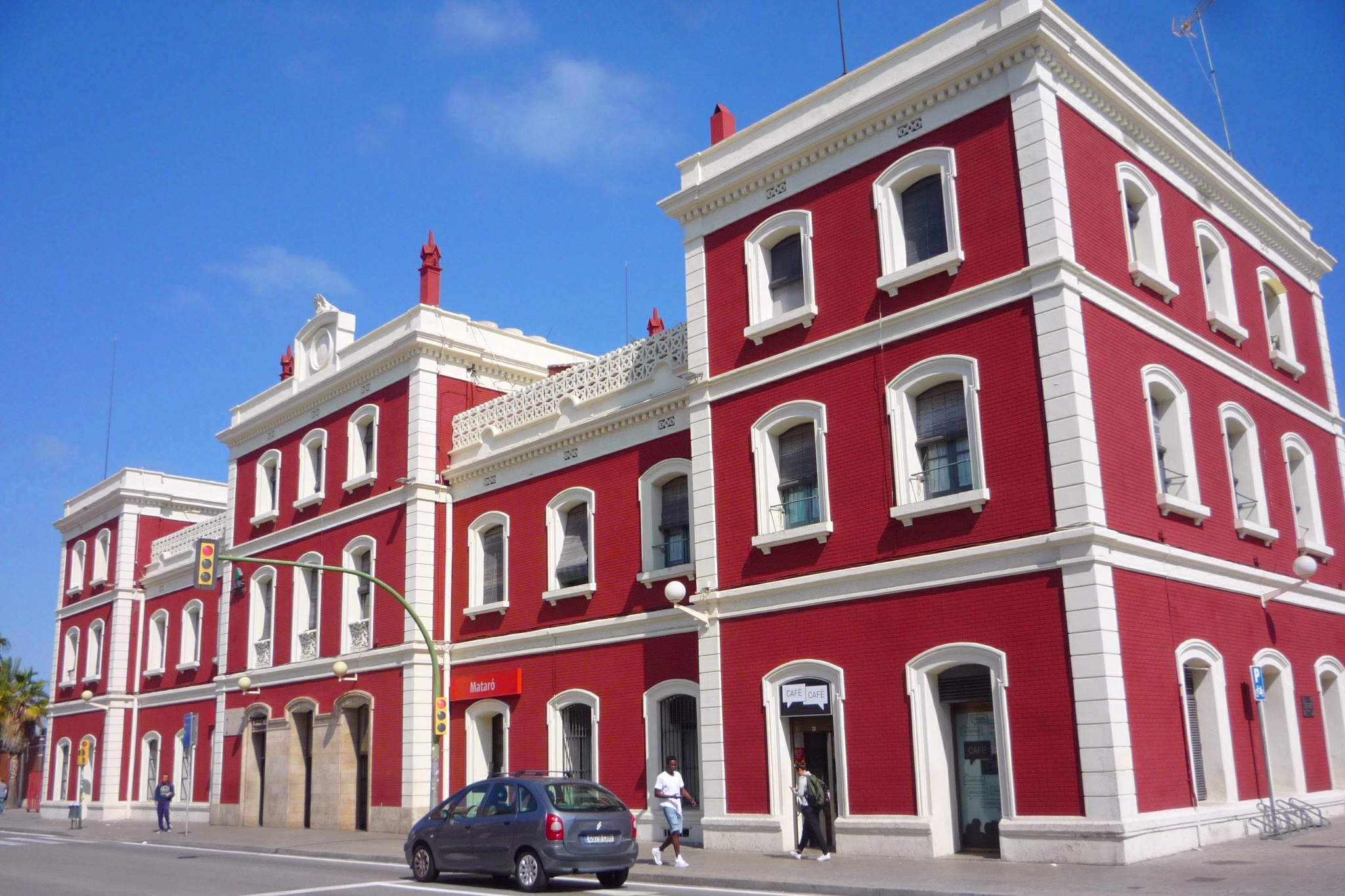 Estación de Mataró (Mataró, provincia de Barcelona).